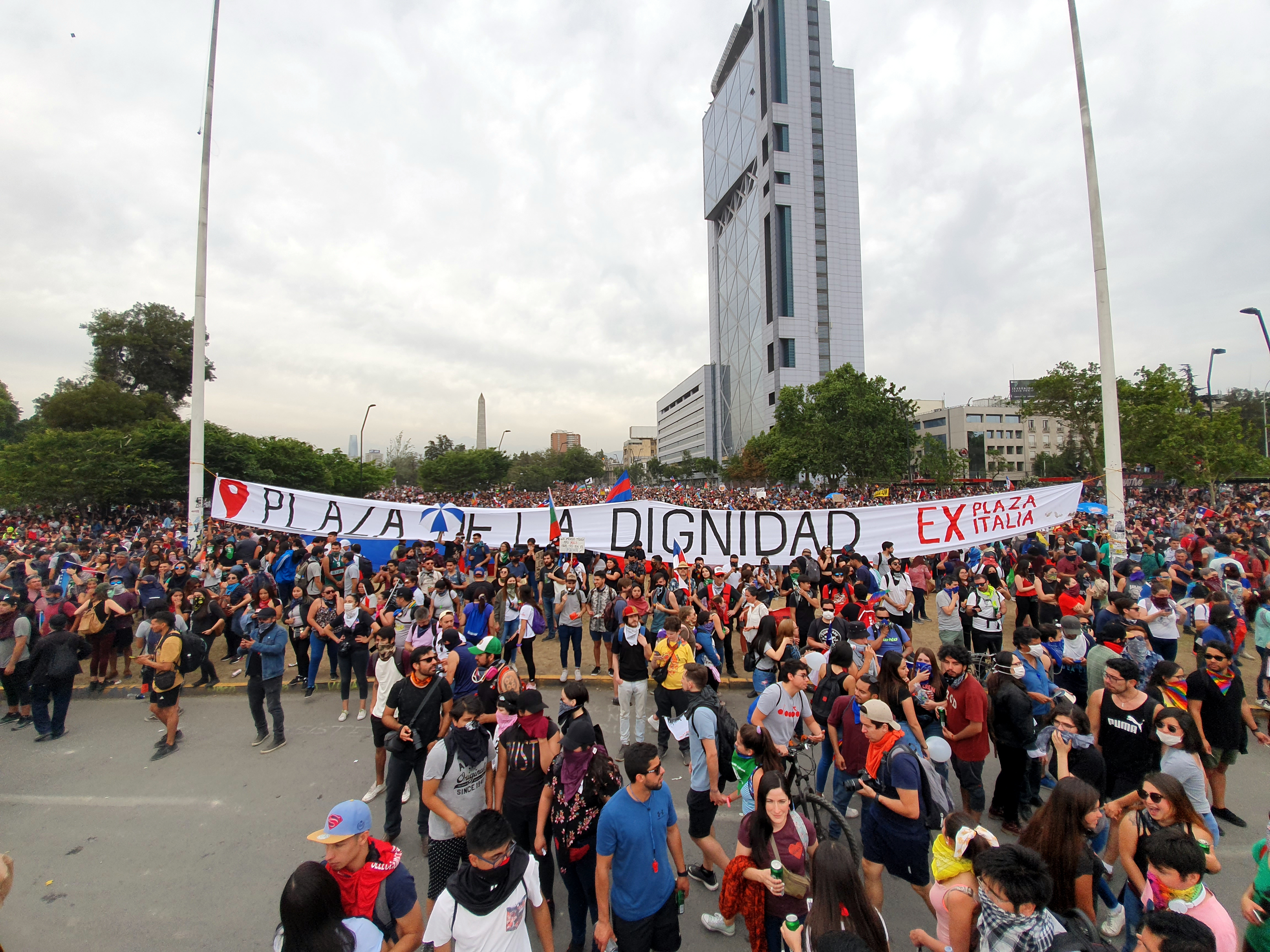 Lienzo con el nombre "Plaza de la Dignidad" durante las protestas de 2019 en Chile.